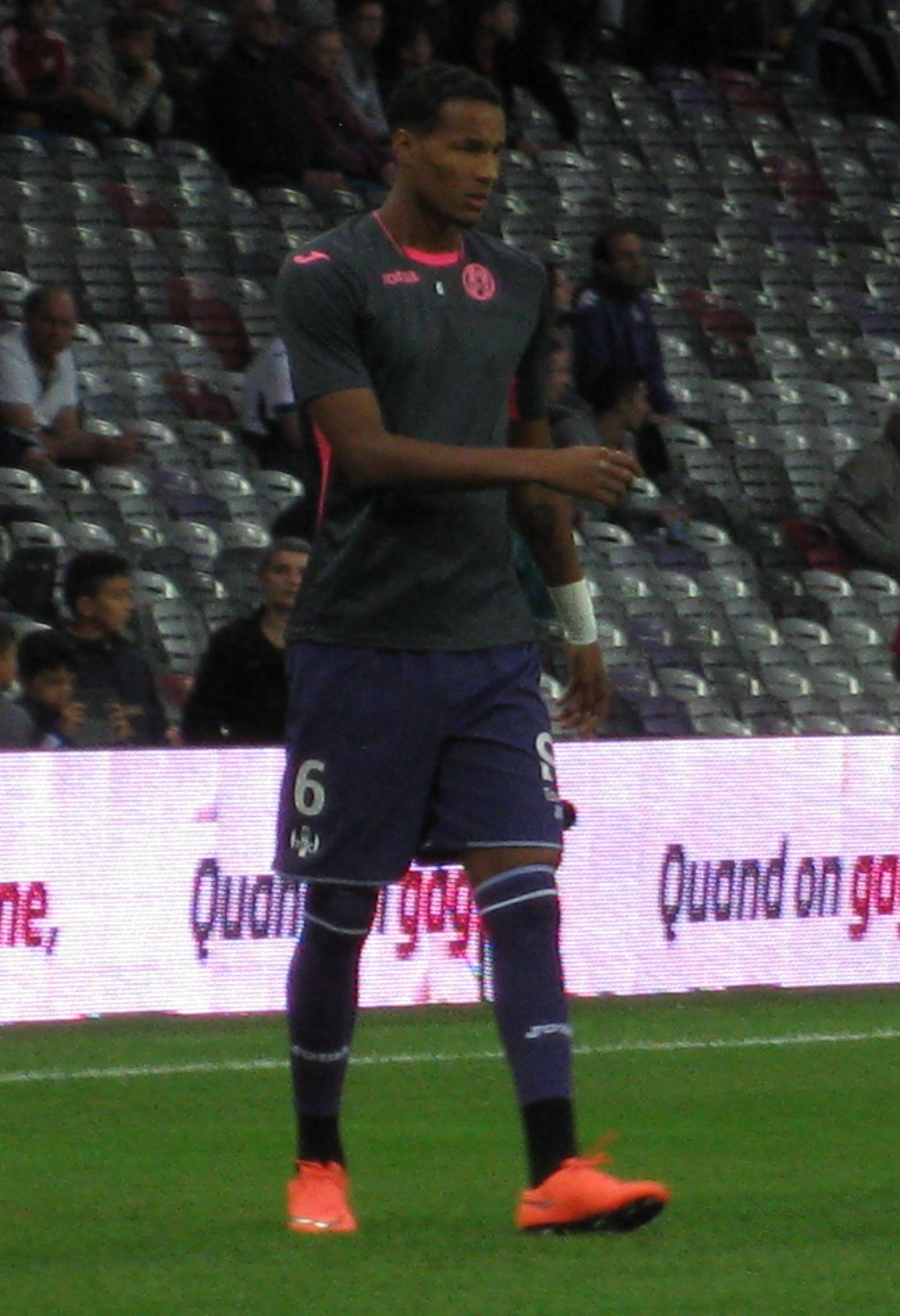 Christopher Jullien, défenseur central du TFC, à l'échauffement au Stadium de Toulouse lors du match Toulouse FC-EA Guingamp comptant pour la 5ème journée de la saison 2016-2017de Ligue 1.